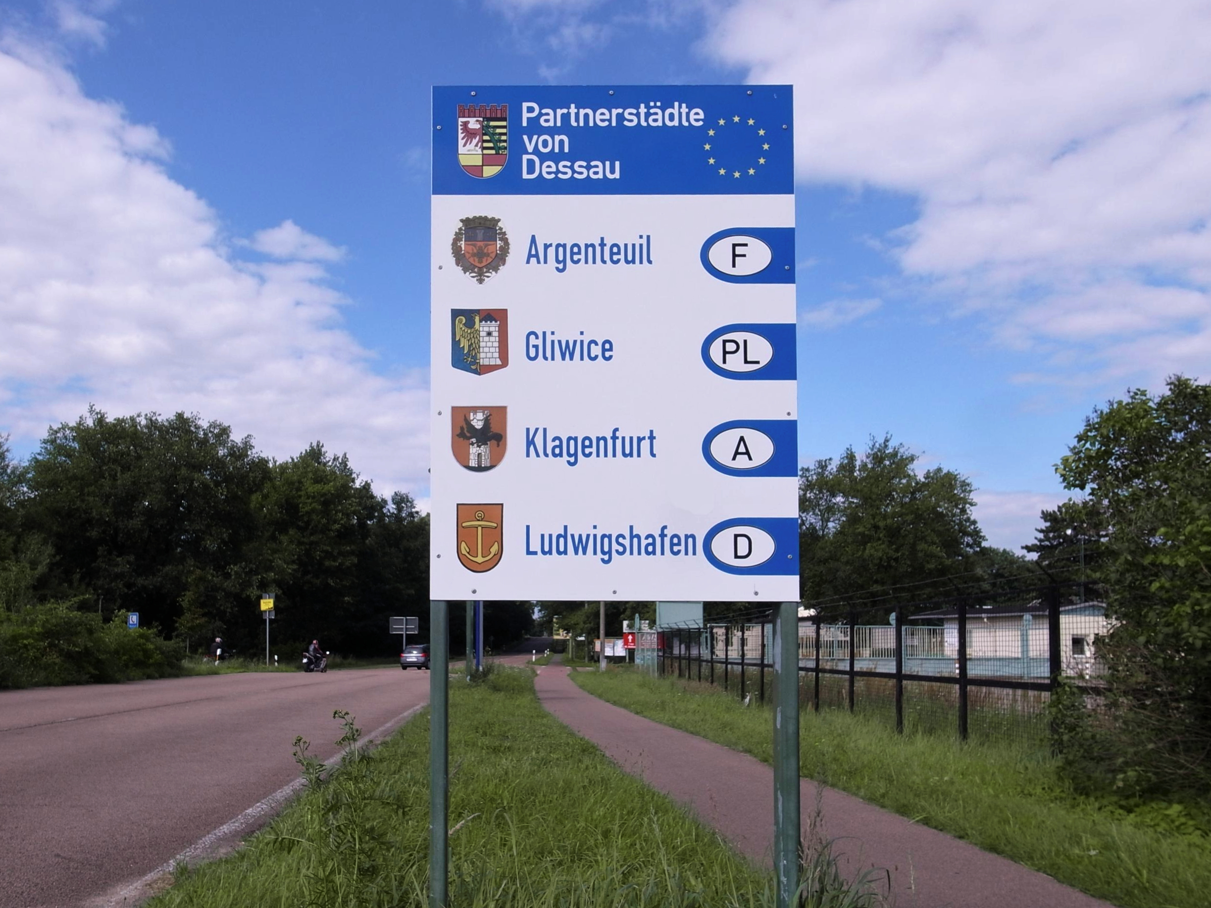 Partnerstädte von Dessau, Infotafel am Ortseingang von Dessau